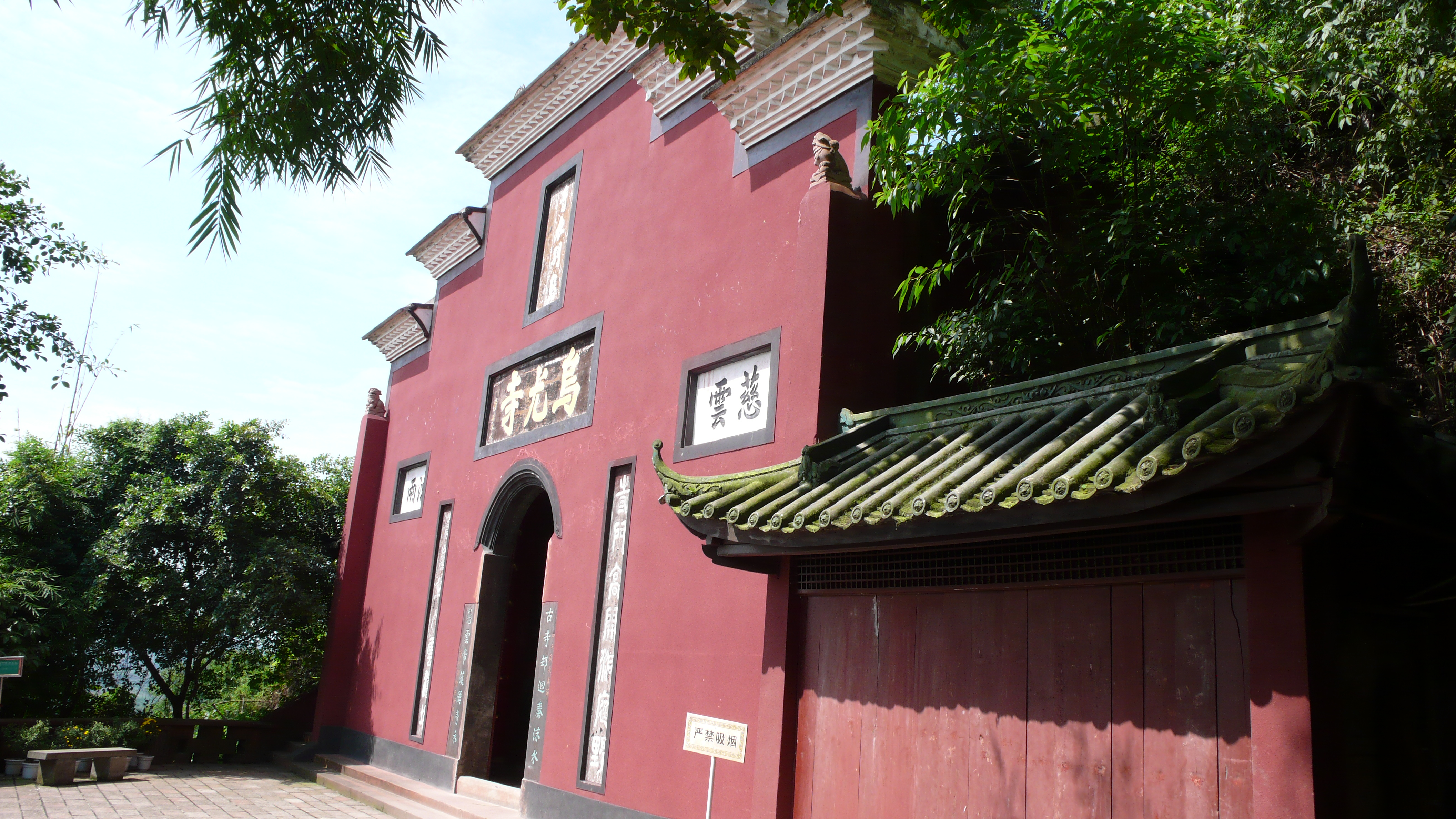 中文（台灣）: 烏尤寺大門